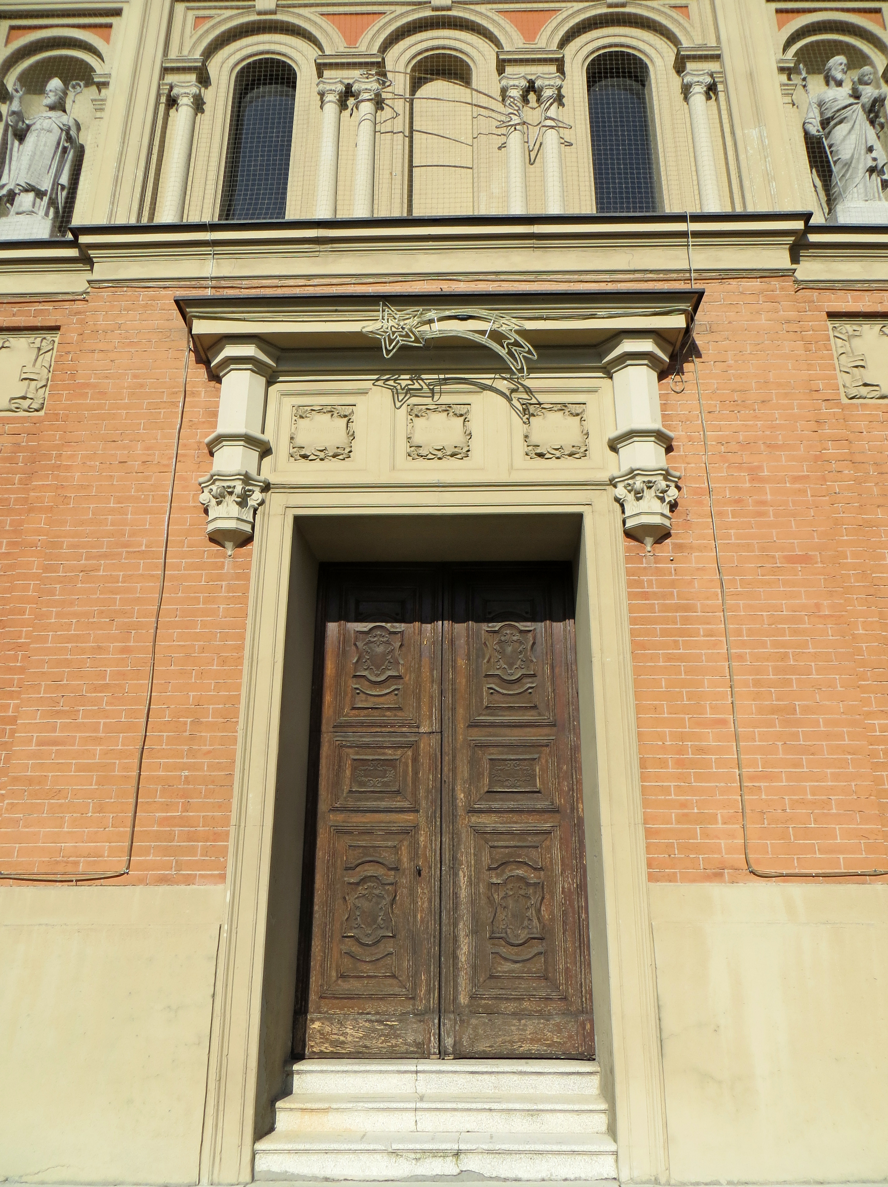 Chiesa di Santo Stefano (Basilicagoiano, Montechiarugolo) - portale d'ingresso